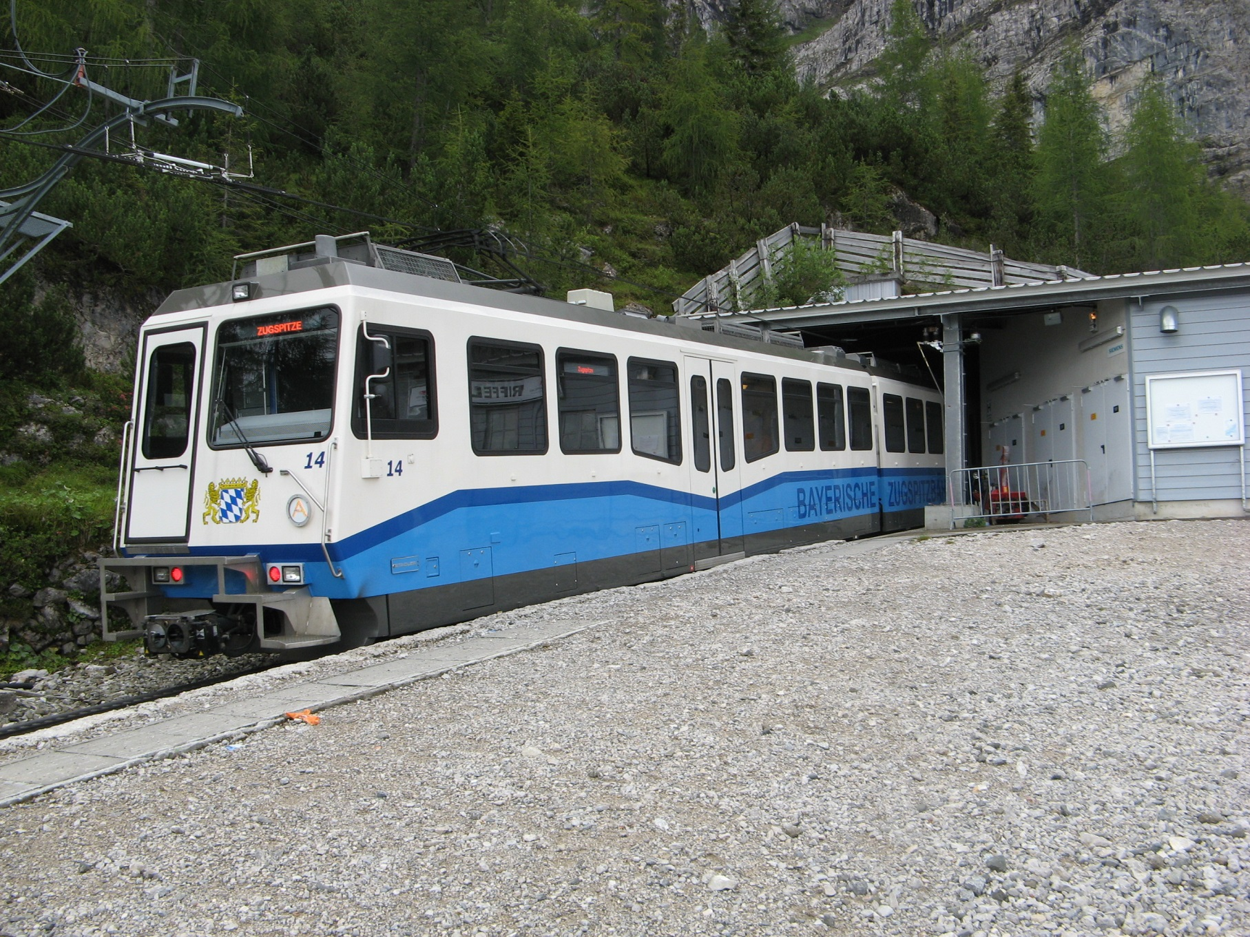 Einfahrt in den Tunnel an der Station Rifflriss